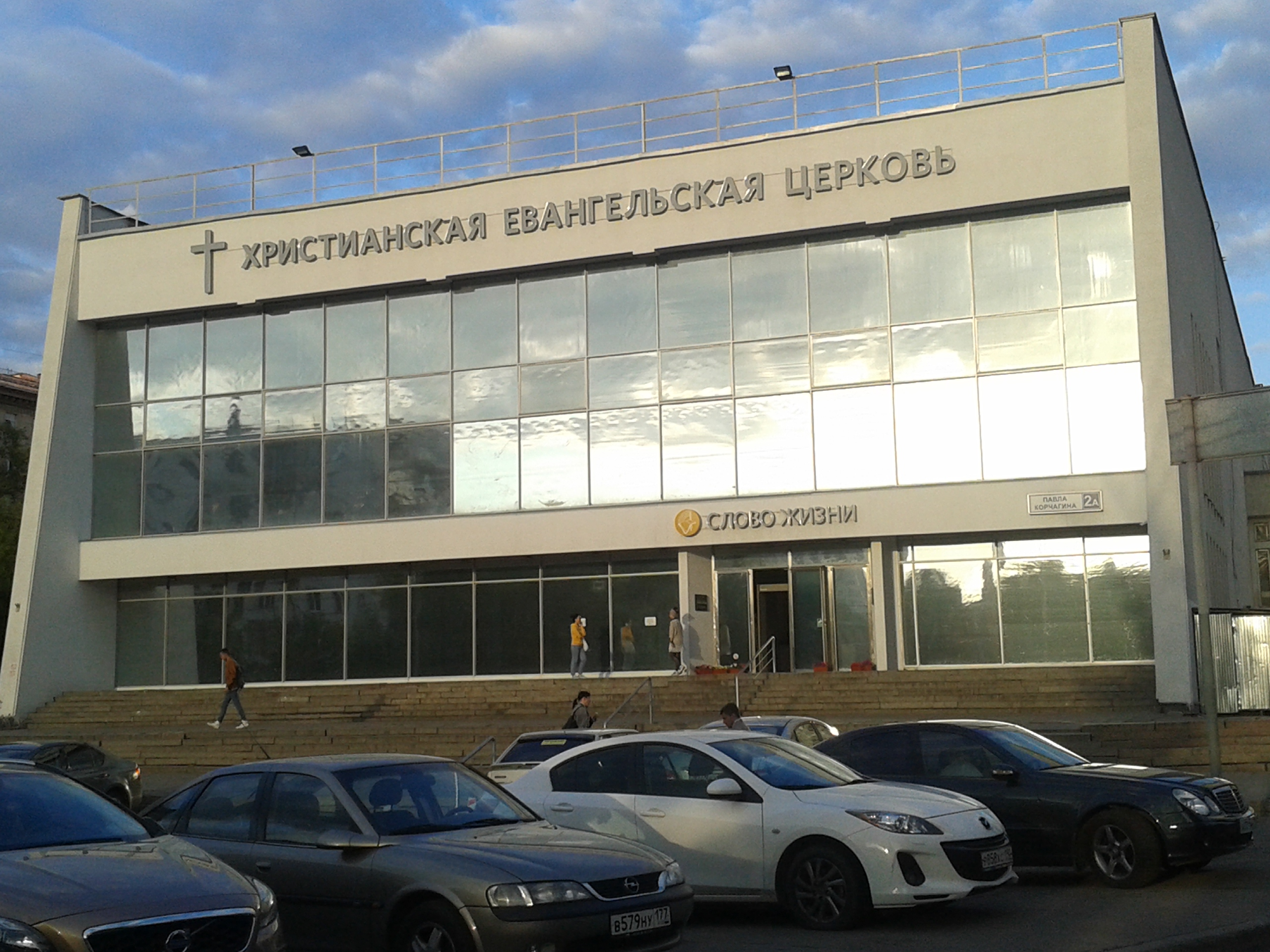 Москва, безымянная площадь на стыке Маломосковской улицы (за спиной фотографа), Павла Корчагина (налево), Рижского проезда (прямо слева), 1-го Рижского переулка (прямо справа) и Новоалексеевской (направо). Адрес зданий с церковью и башней Мосгипротранса - Павла Корчагина, 2. Бывший дом культуры «Мосгипротранс». Библейский центр христиан веры евангельской «Слово жизни»